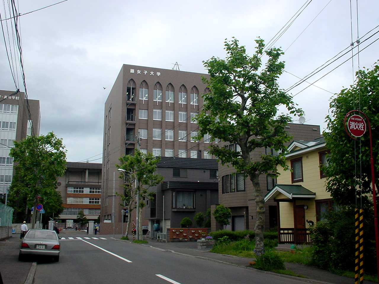 藤女子大学（2006年6月17日投稿者が撮影）